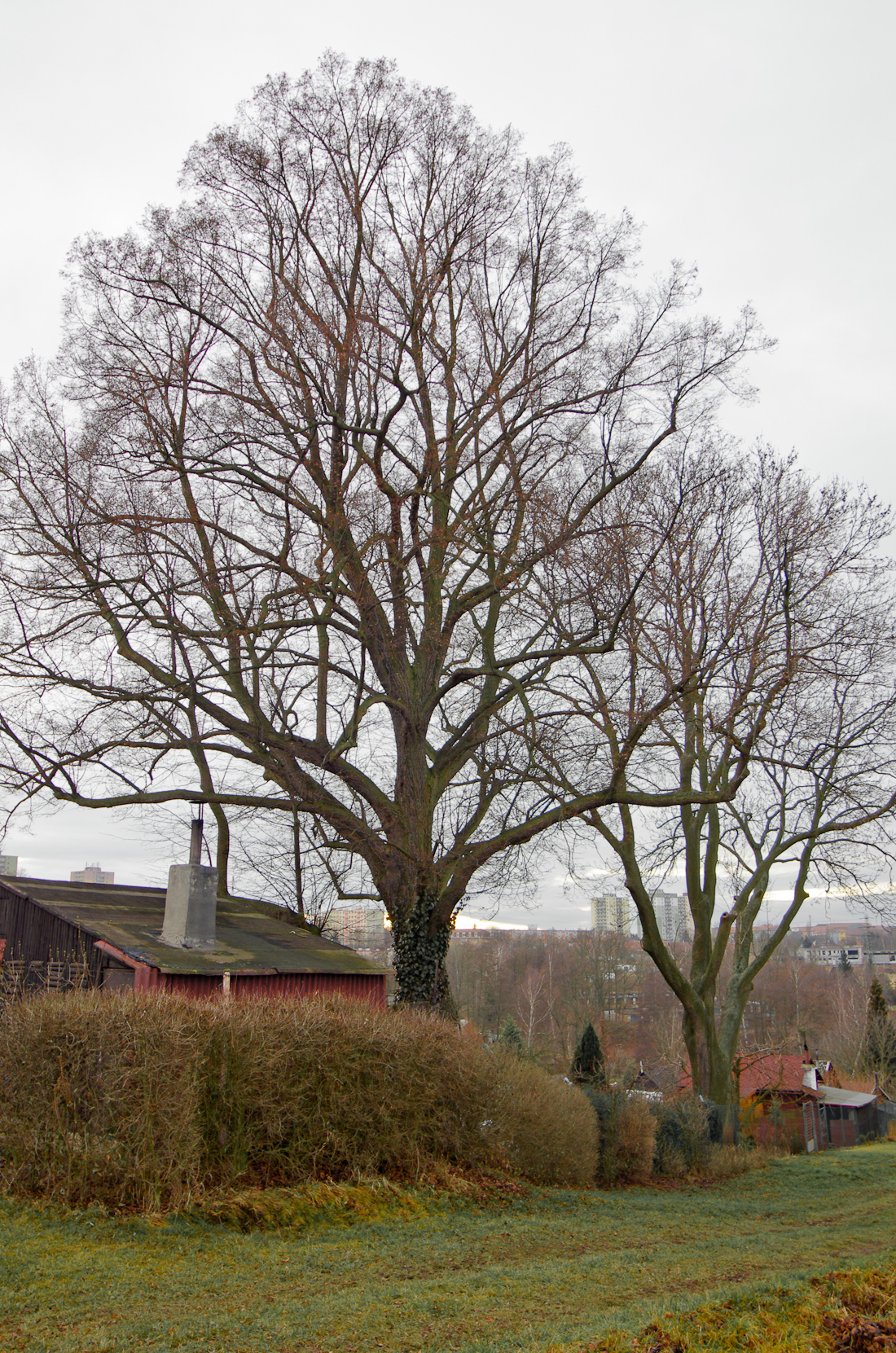 Lípa u Kopeckých, bývalý památný strom v Těšovicích, okres Sokolov, (památková ochrana stromu byla zrušena v říjnu 2013 z důvodu výrazného zhoršení zdravotního stavu.